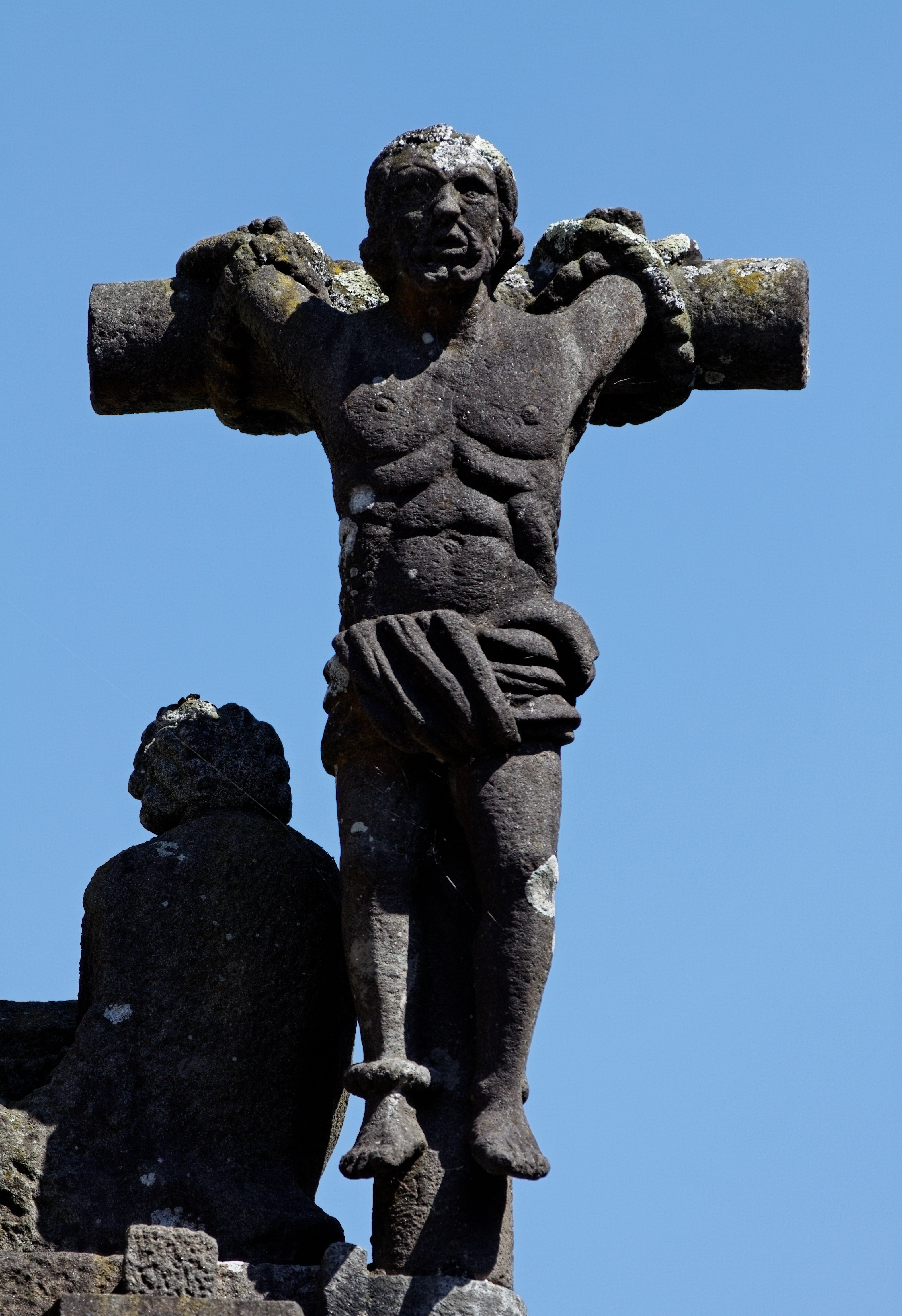 Vue de l'église Notre-Dame de Lampaul-Guimiliau.